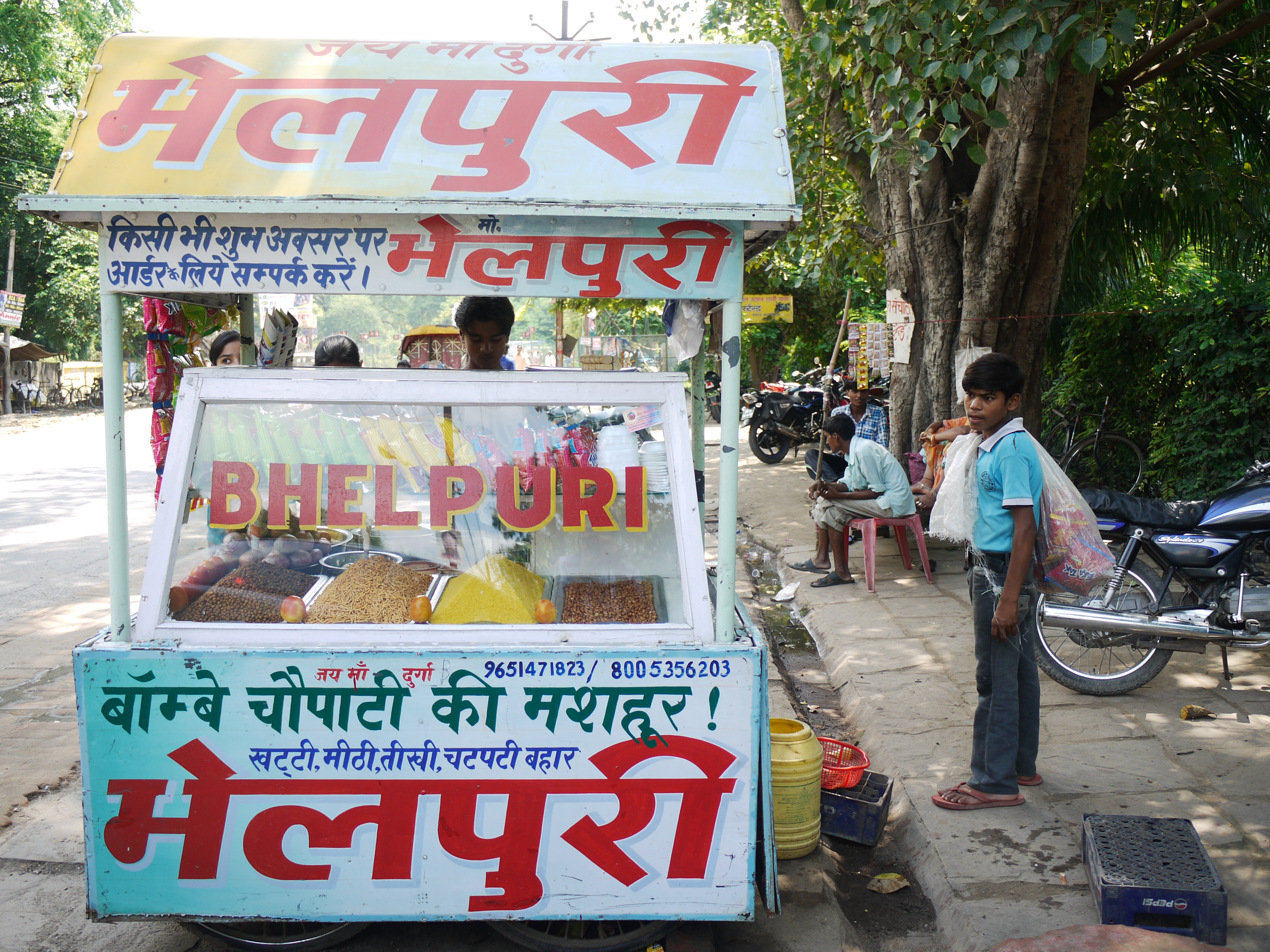 Bhelpuri stall